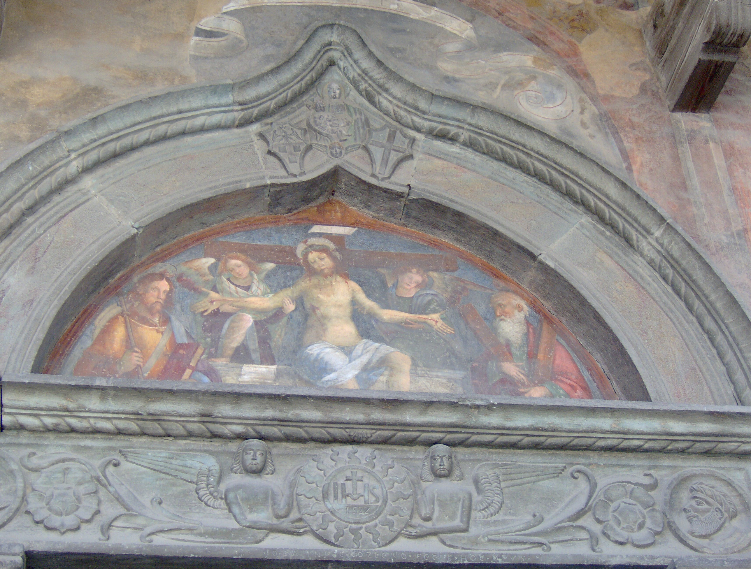 Portale di San Giacomo -Chiuro (so)- Lunetta dipinta da Valorsa - Foto Romeri M.